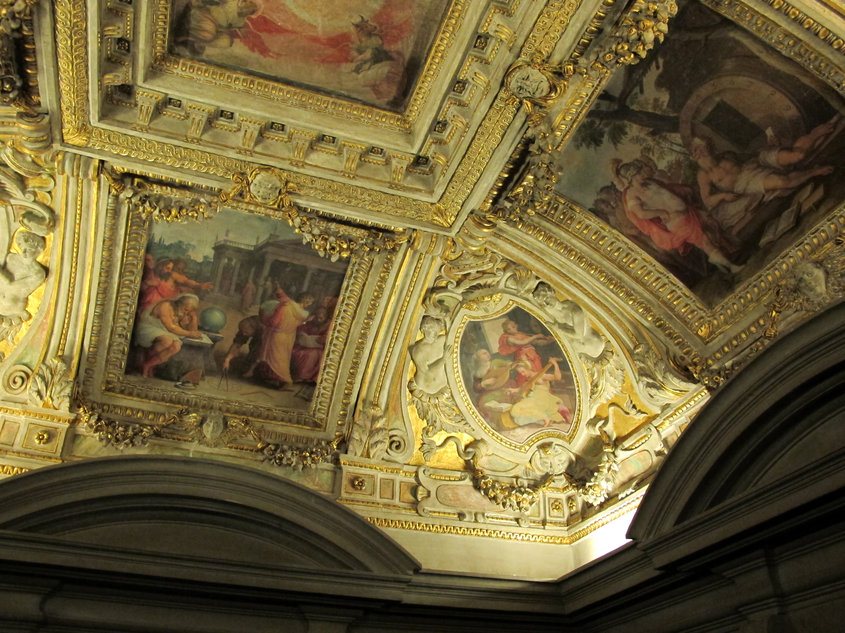 Tesoretto di cosimo I, volta, astronomia